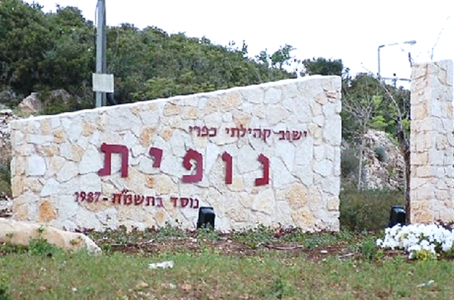 הכניסה ליישוב נופית